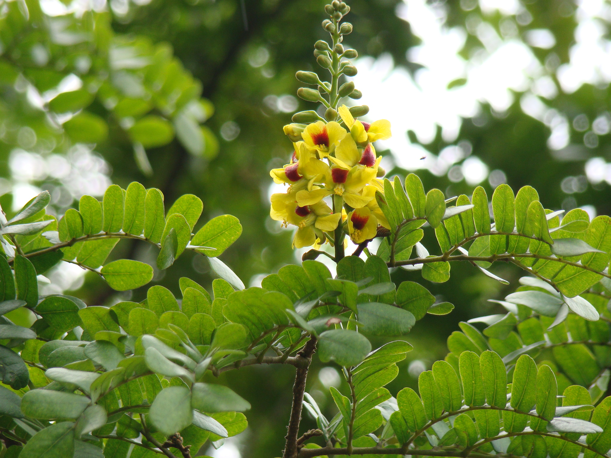 Caesalpinia echinata, Ceret São Paulo